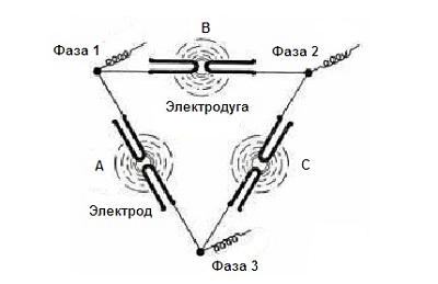 Расположение однофазных печей Биркеланда-Эйде с шестью регулируемыми электродами